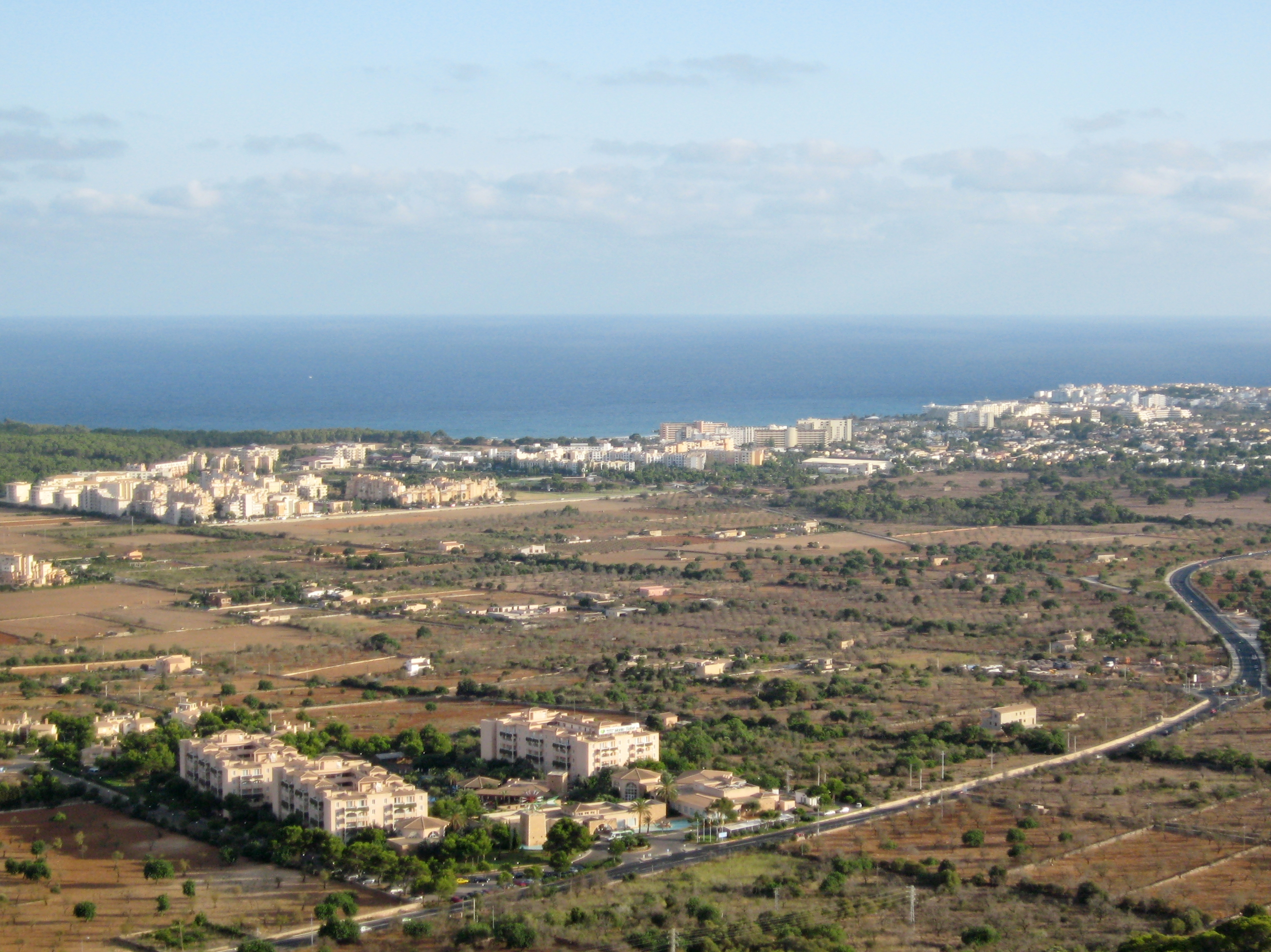 Blick auf Sa Coma und S’Illot, Gemeinde Sant Llorenç des Cardassar, vom Berg Na Penyal, Mallorca, Spanien